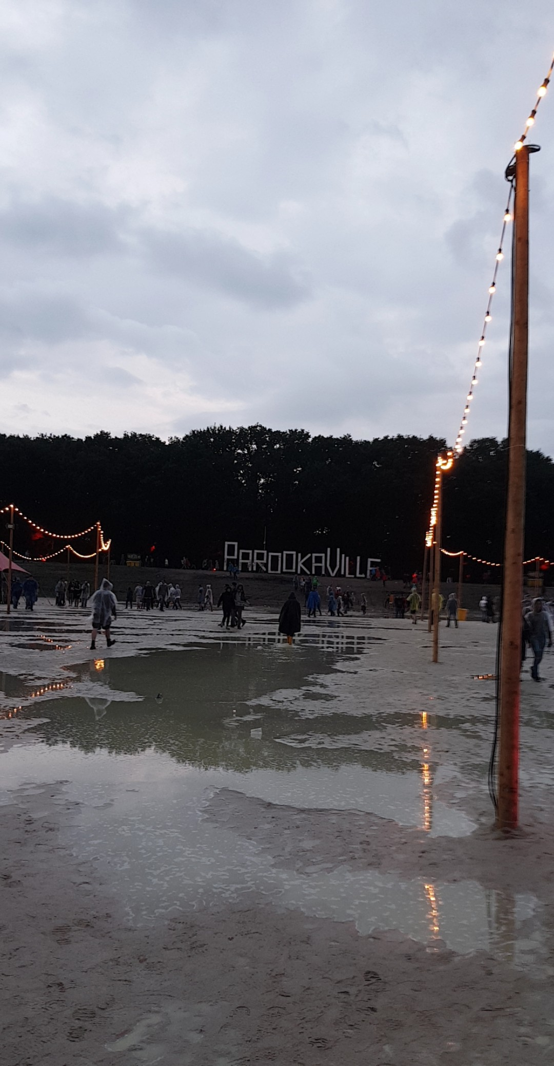 Parookaville 2017 Regen